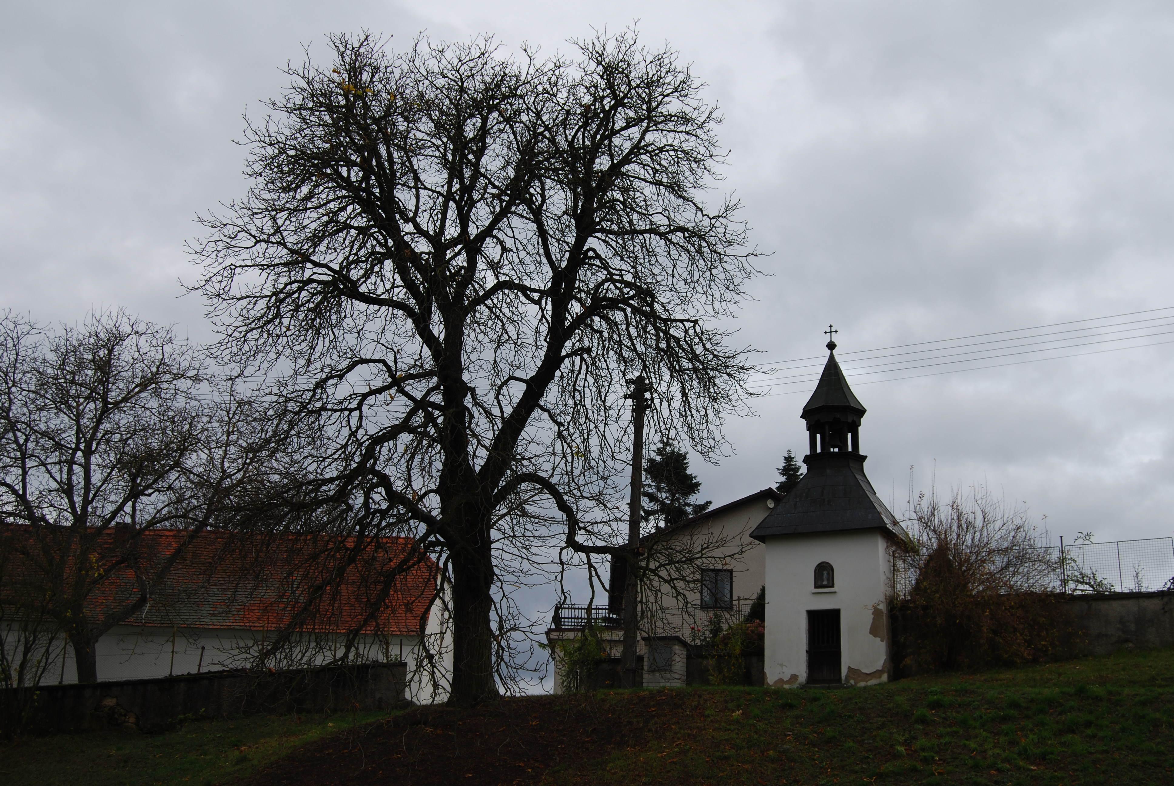 Kaple ve vesnici. Planá je část obce Klučenice. Okres Příbram. Česká republika.